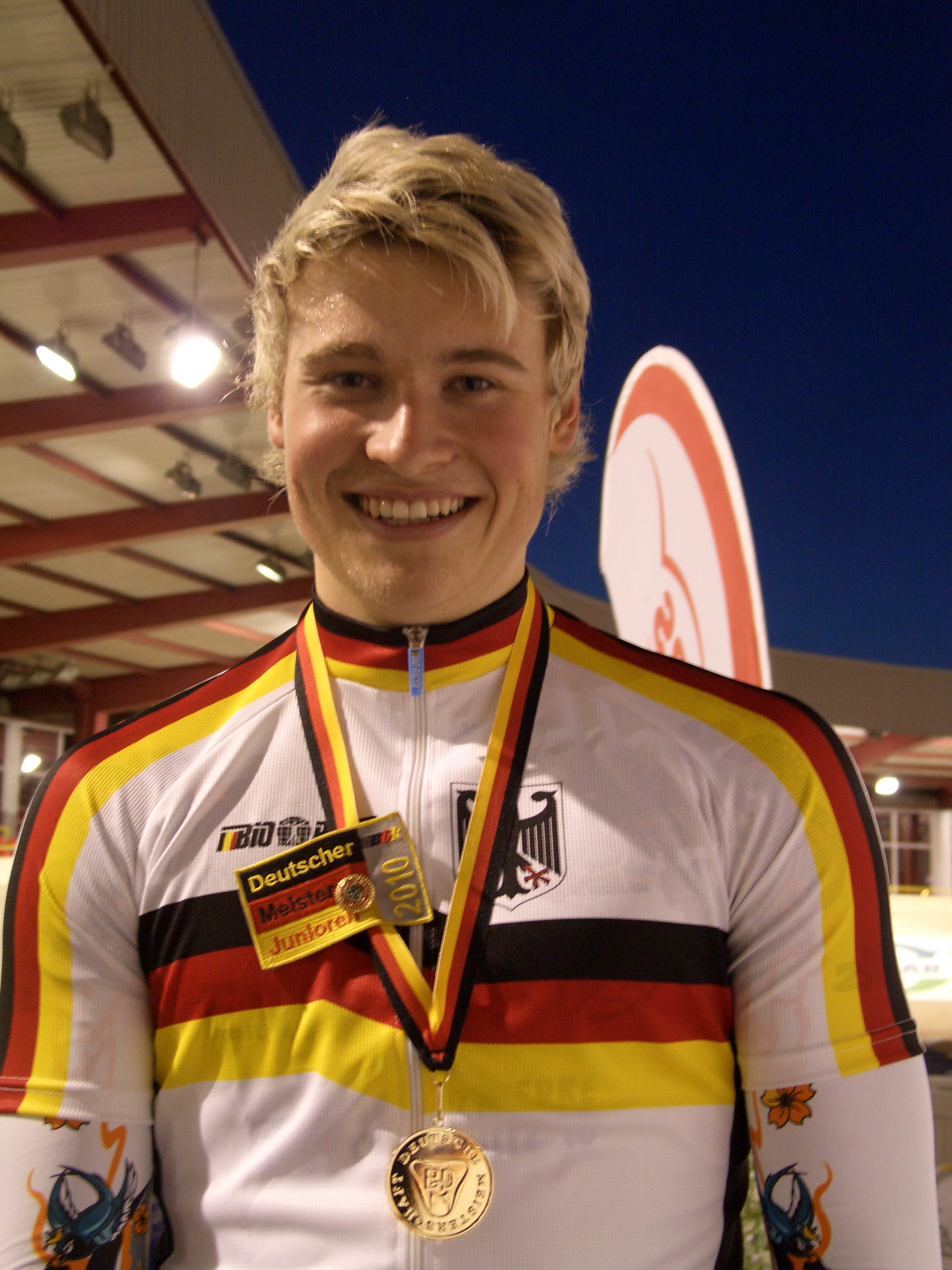 Stefan Bötticher, deutscher Radrennfahrer